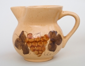 Bukaleta iz Istre u kojoj se poslužuje vino ili Istarska supa tj. Istarska supica